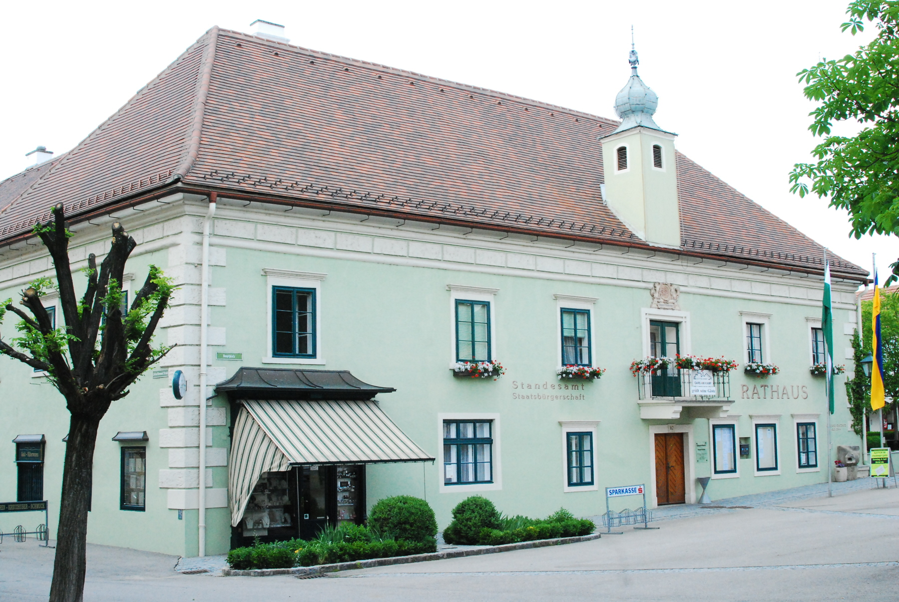 Rathaus von Gars am Kamp in Niederösterreich